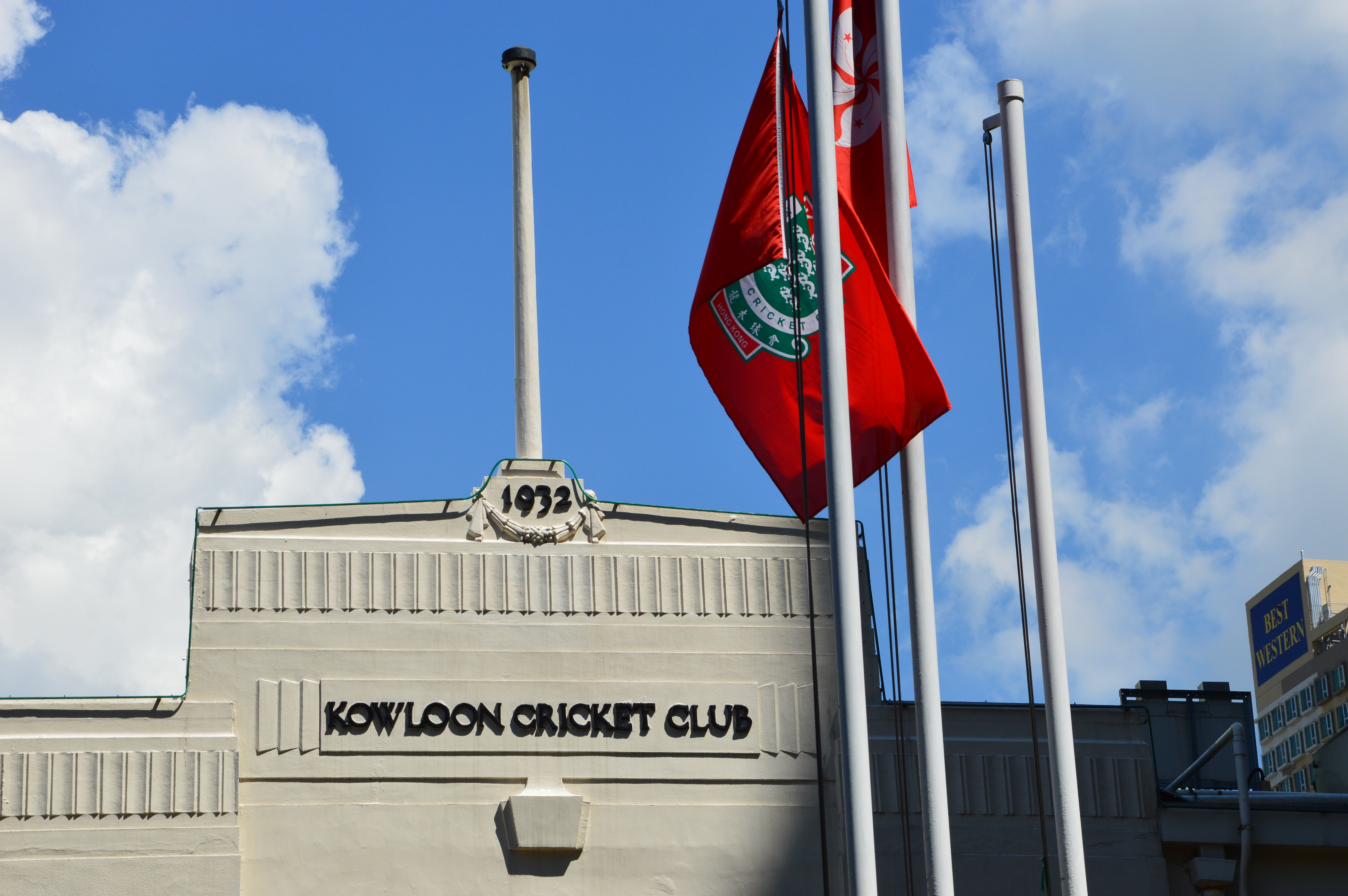 Kowloon Cricket Club